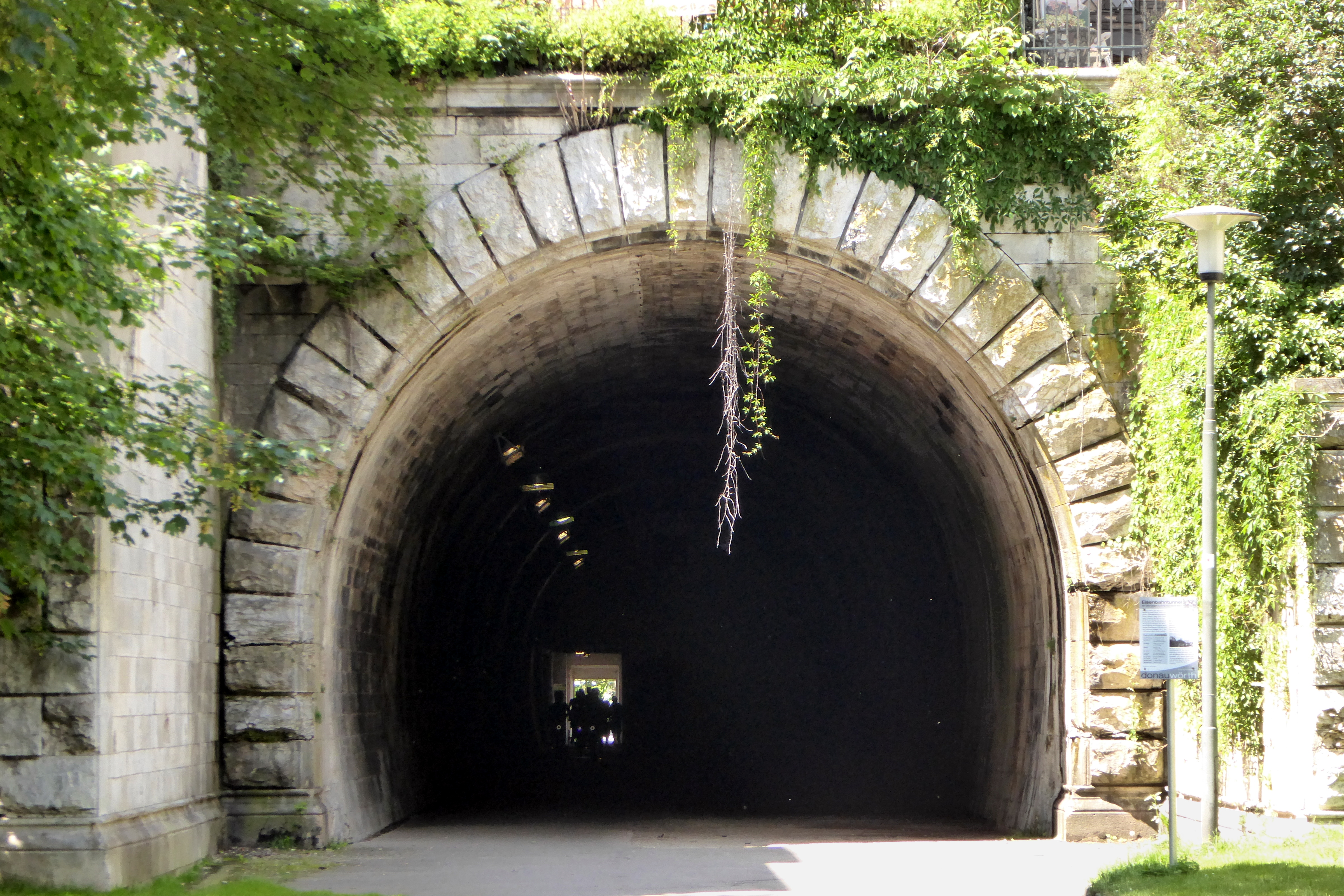 Ostportal des ehemaligen Eisenbahntunnels in Donauwörth.